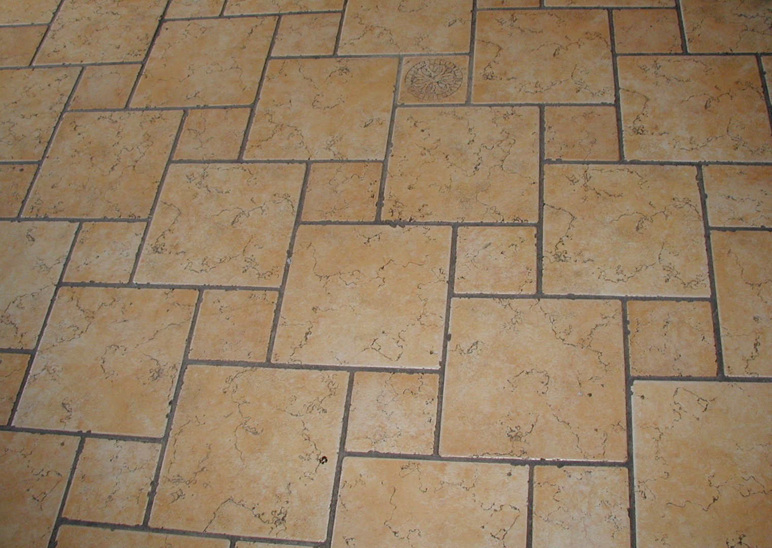 Baldosas de un castillo en Austria Tiles in Oberkapfenberg Castle in Styria (Austria) on 25 June 2005. Picture taken and uploaded by Roger McLassus.